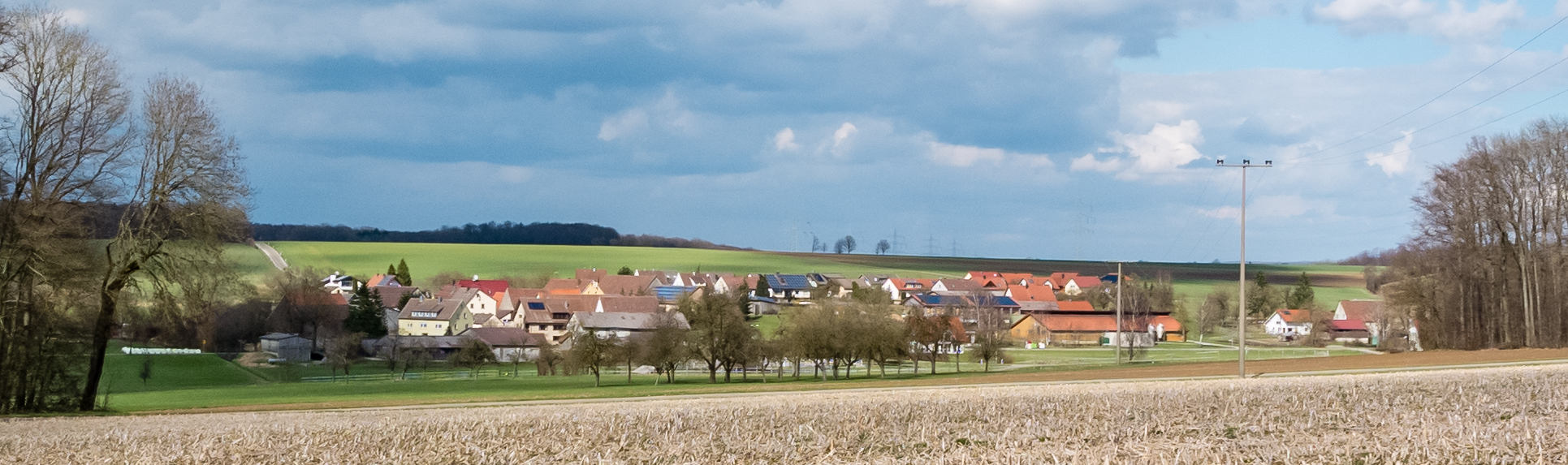 Der zum Künzelsauer Ortsteil Steinbach gehörende Weiler Ohrenbach. Ansicht aus südwestlicher Richtung.